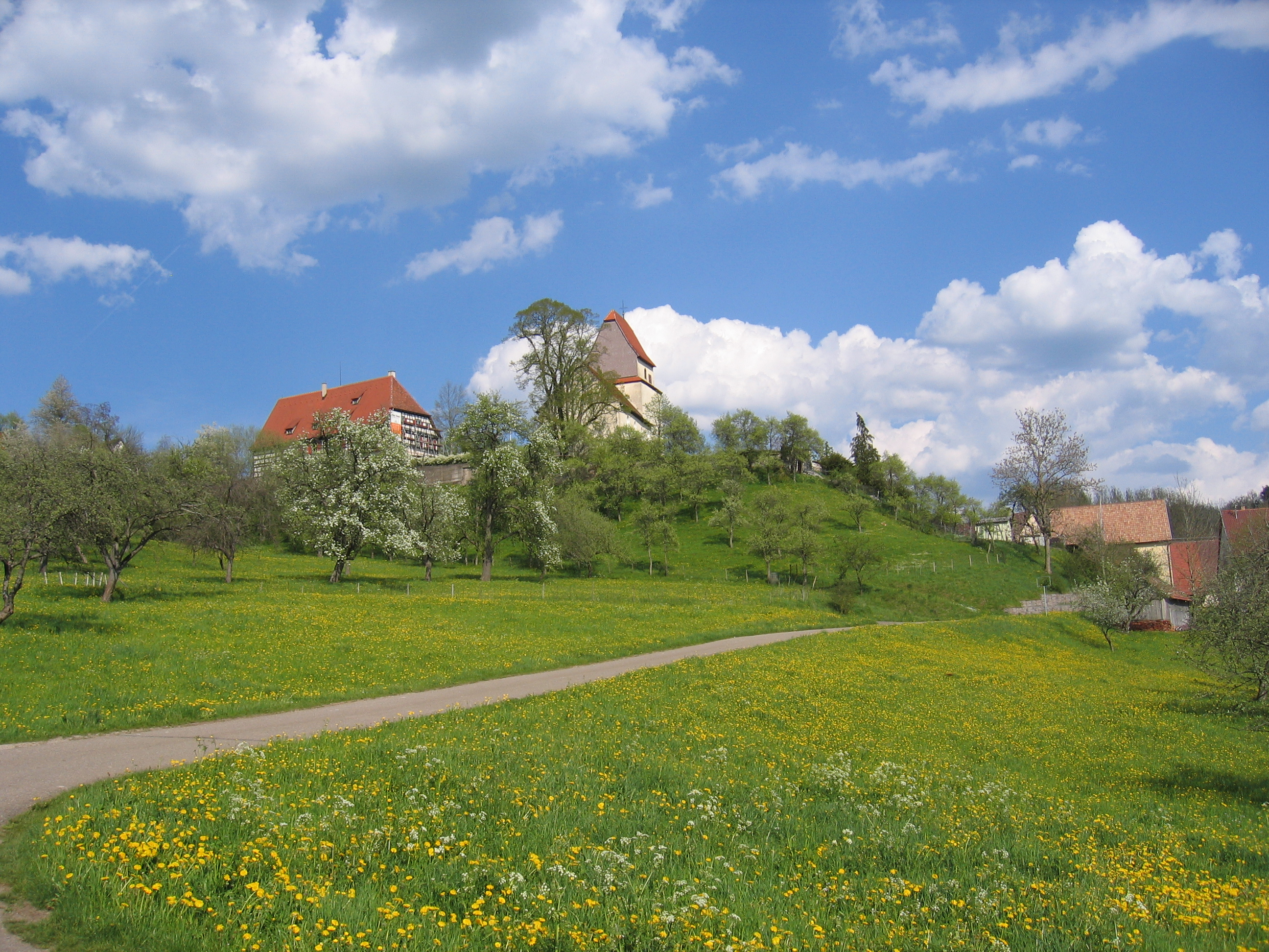 Das Dorf Gößlingen von det Straße her gesehen